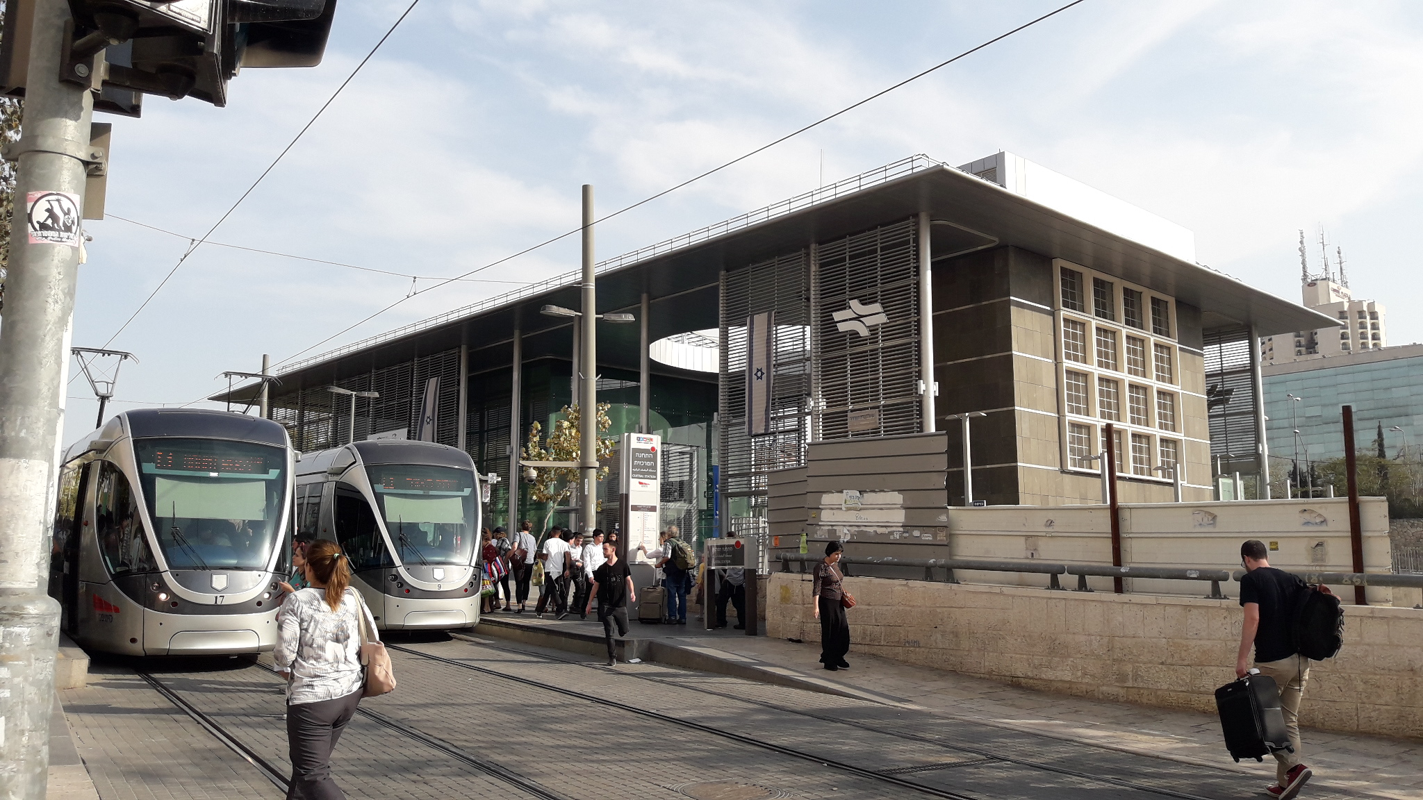 תחנת בנייני האומה